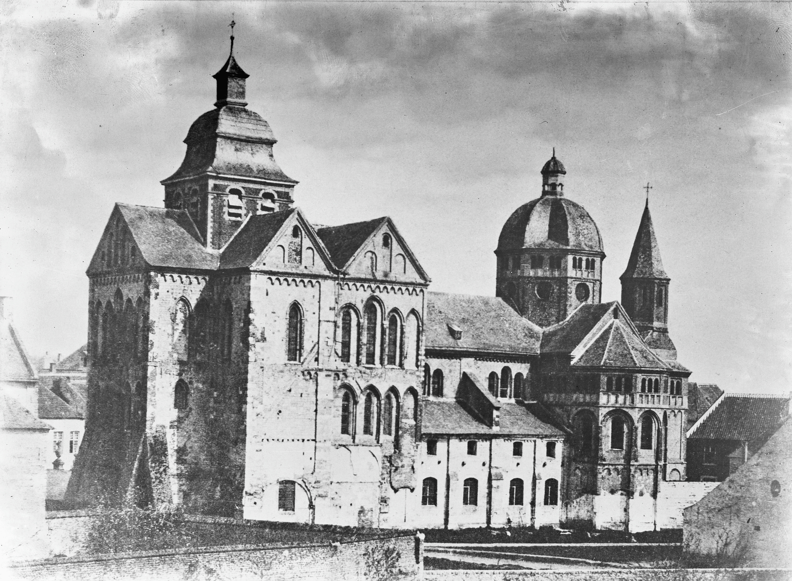 Munster Kerk Of Onze Lieve Vrouwe Kerk: kerk voor de restauratie naar het noord-oosten